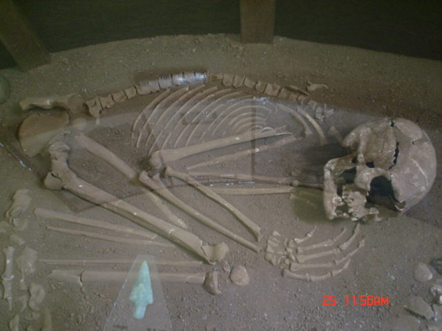 Ossada encontrada em Lagoa Santa, MG, Brasil.